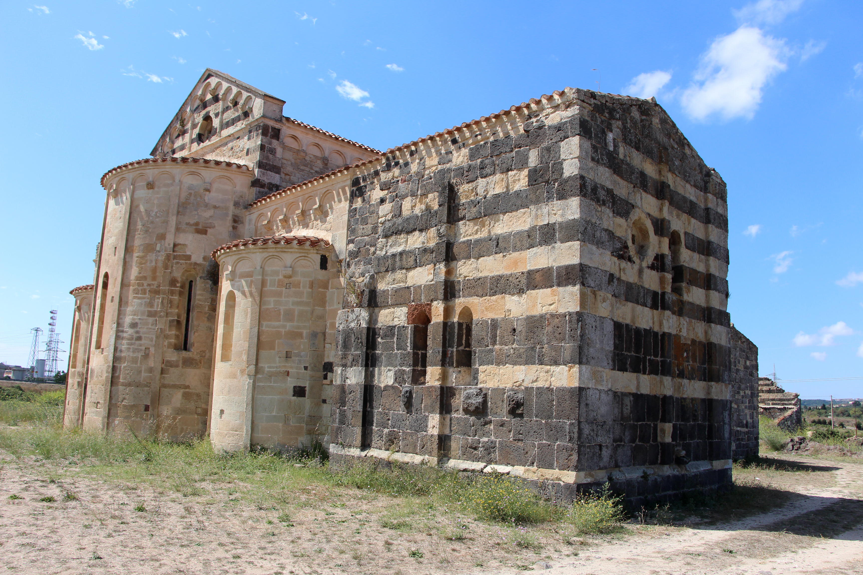 Ploaghe, SS